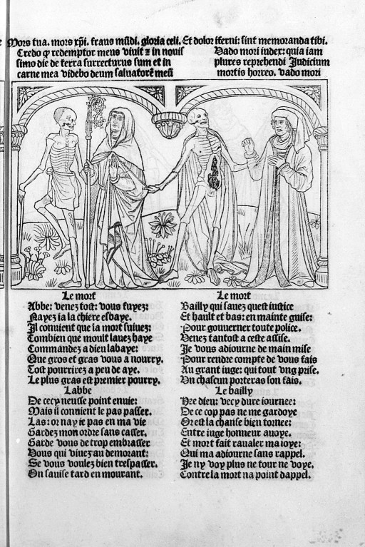 La Danse macabre. Paris, Guy Marchant, 1486 : Un abbé et un bailli. Illustration numérisée d'après le microfilm R 1760, Paris, BnF (Réserve des Livres rares et précieux), cote : Res Ye 189/Microfilm R 1760